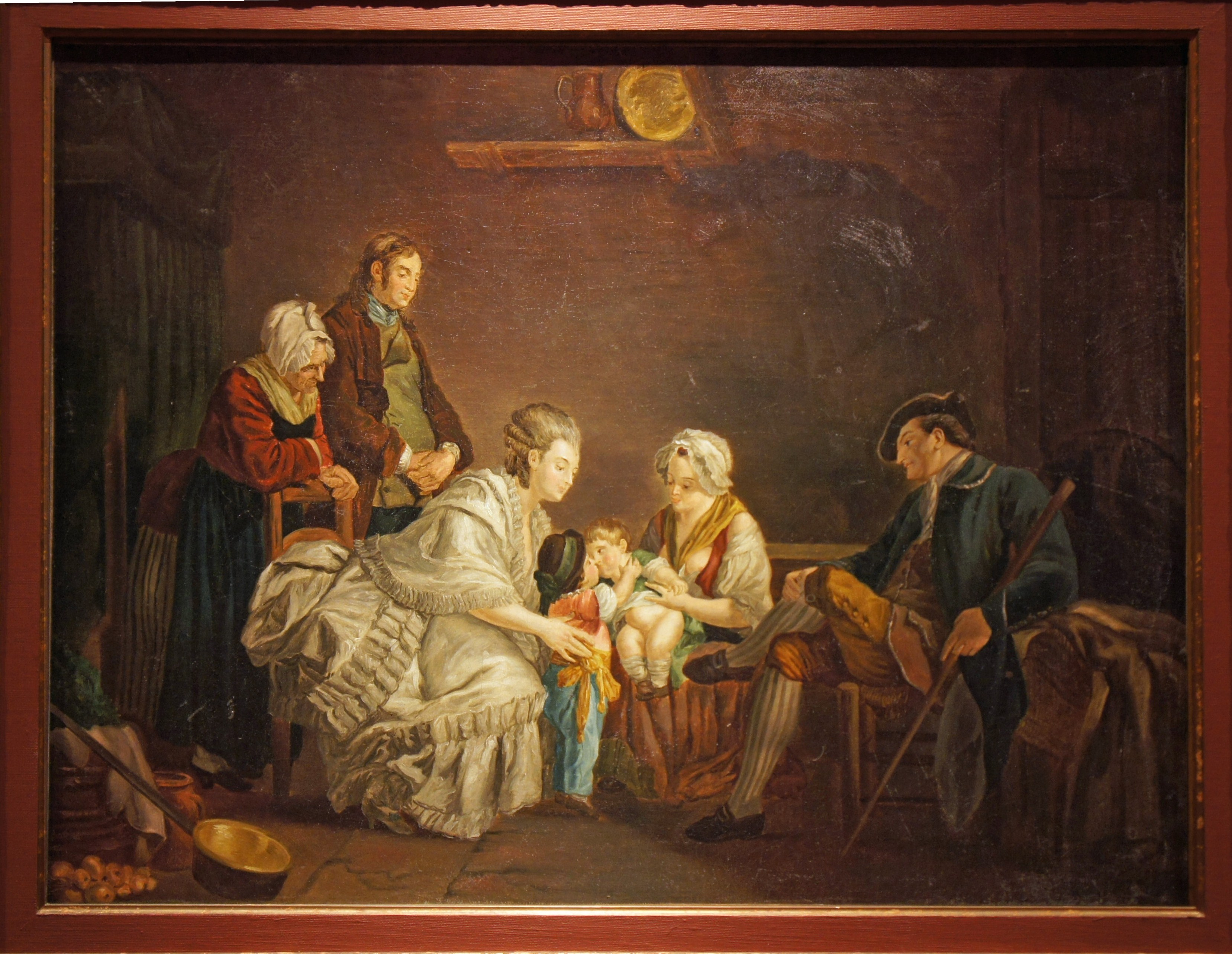 Leg Mielle-Cailloux . Par Etienne Aubry Visite à la nourrice peinture du XVIII.